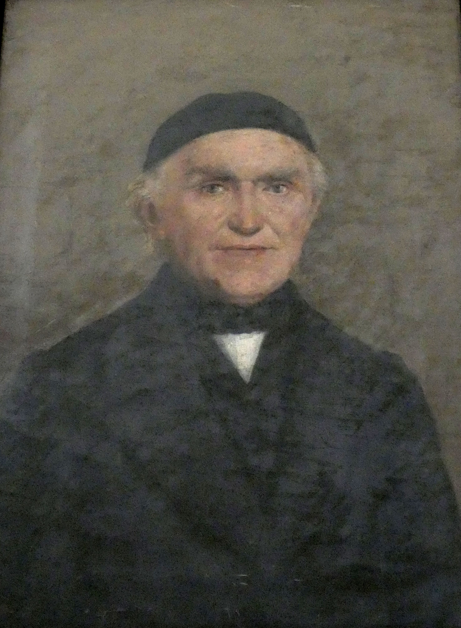 Fotografische Reproduktion (bearb.) eines Porträtgemäldes des Oberpfarrers der Marktkirche Halle Carl Christian Leberecht Franke